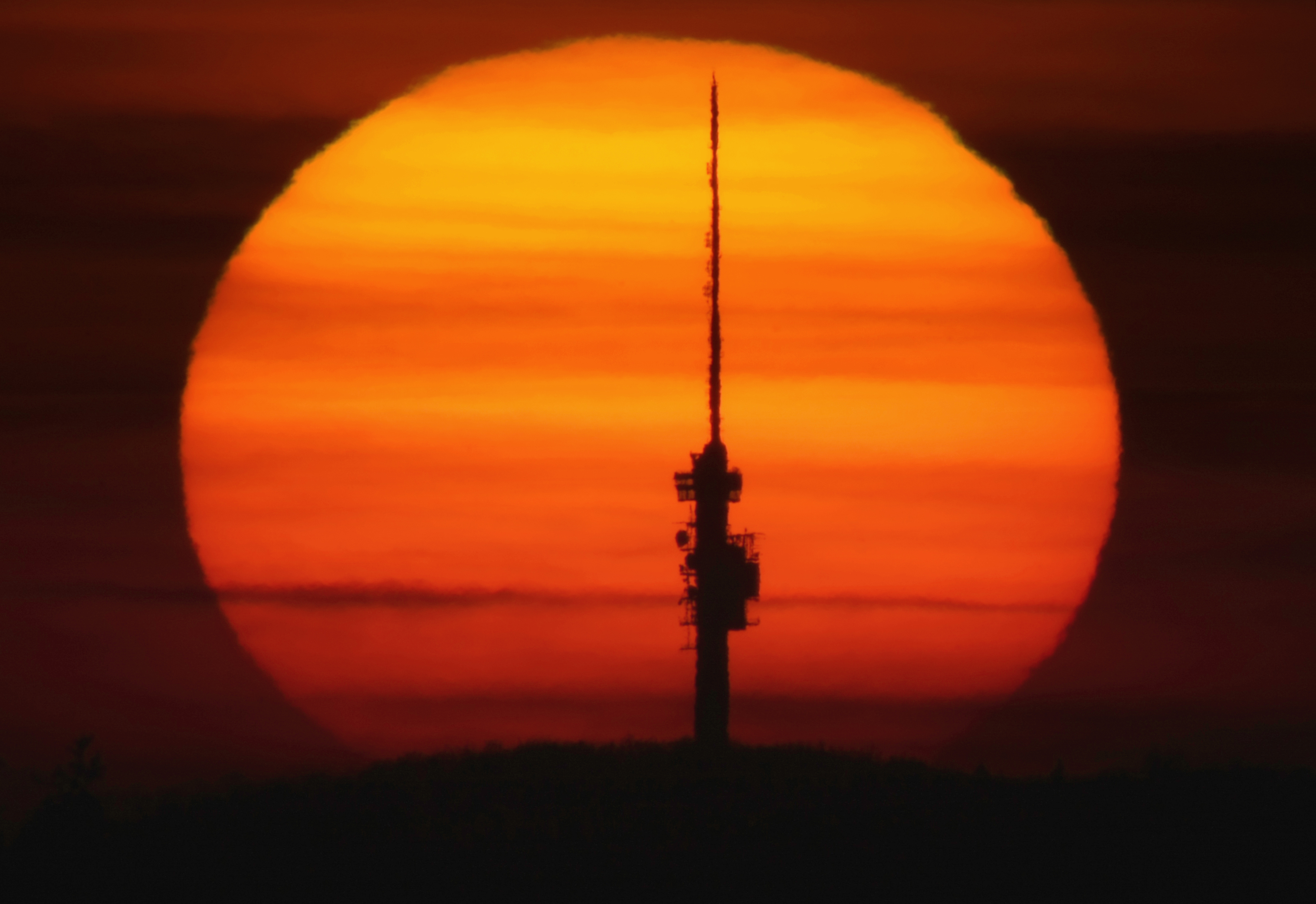 Sonnenuntergang hinter dem Fernsehturm St. Chrischona (Bettingen bei Basel, Schweiz), geschossen um 20:00 am 6.4.2010 von einem Hügel nähe Kaisten (Aarau, Schweiz) mit einem 2500mm Teleobjektiv.